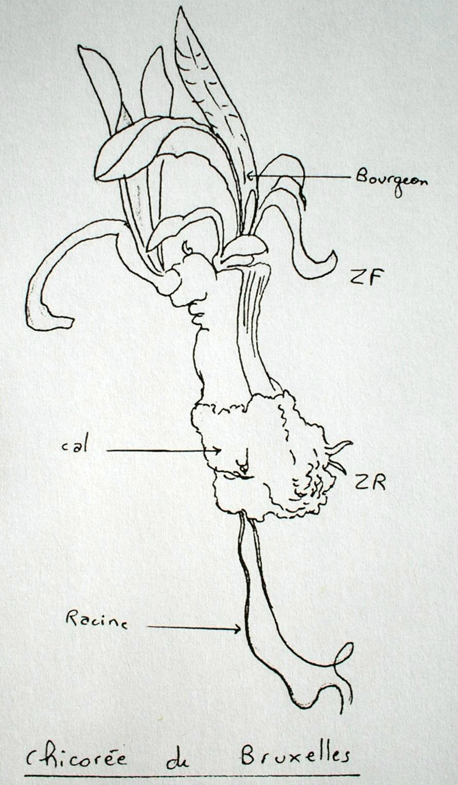 Dessin d'un cal, obtenu dans la zone racinaire, sur une "frite" de chicorée de Bruxelles mise en culture in vitro.